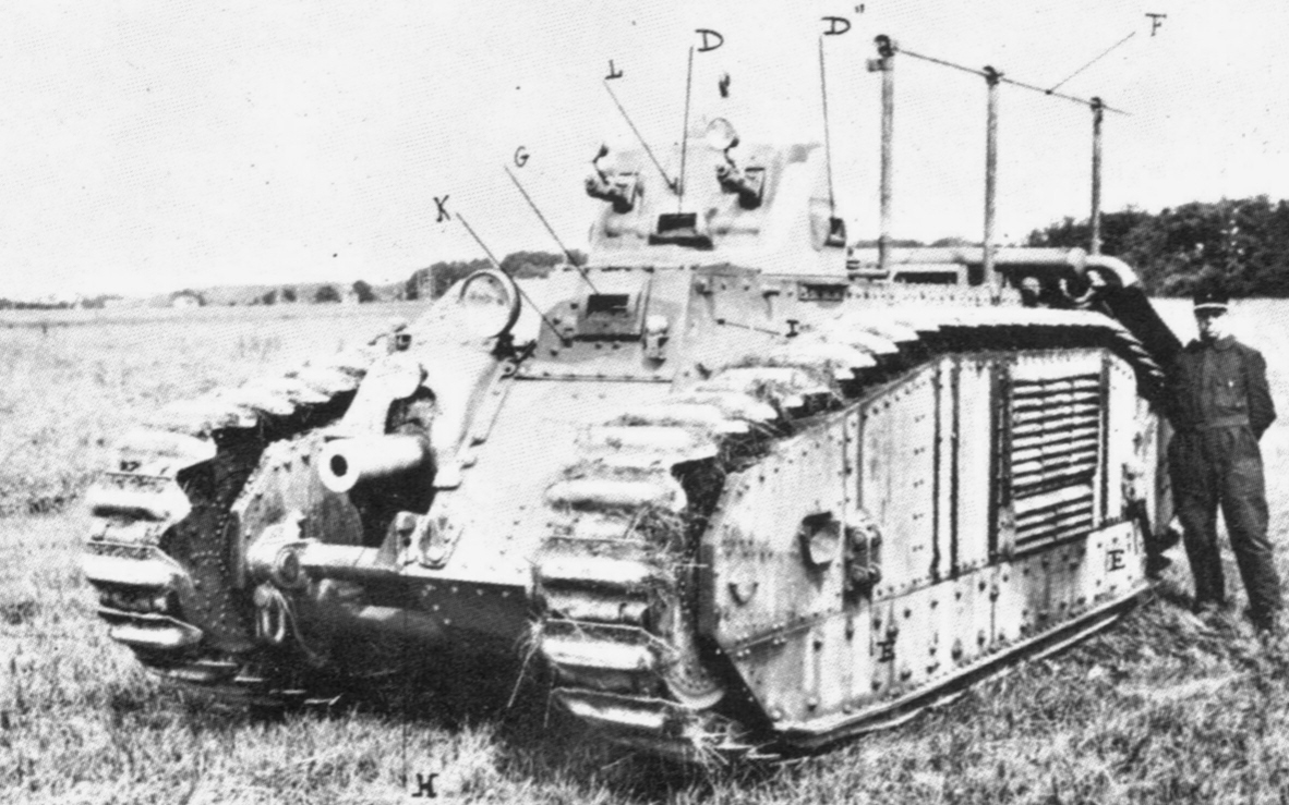 Elektronische reproductie van foto van prototype Char B-tank